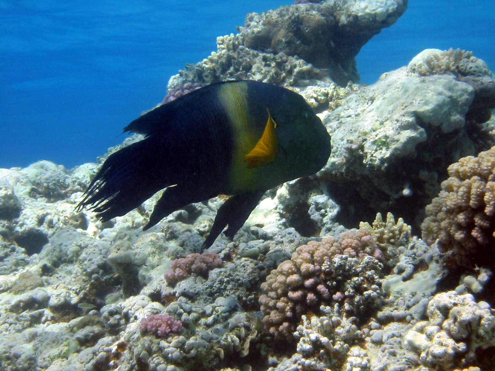 Dahab Egypt 2003